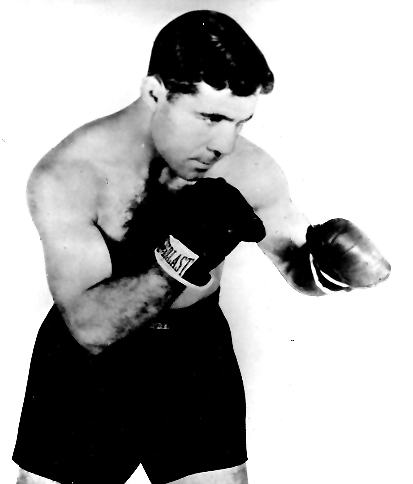 Campeón del Mundo del peso gallo